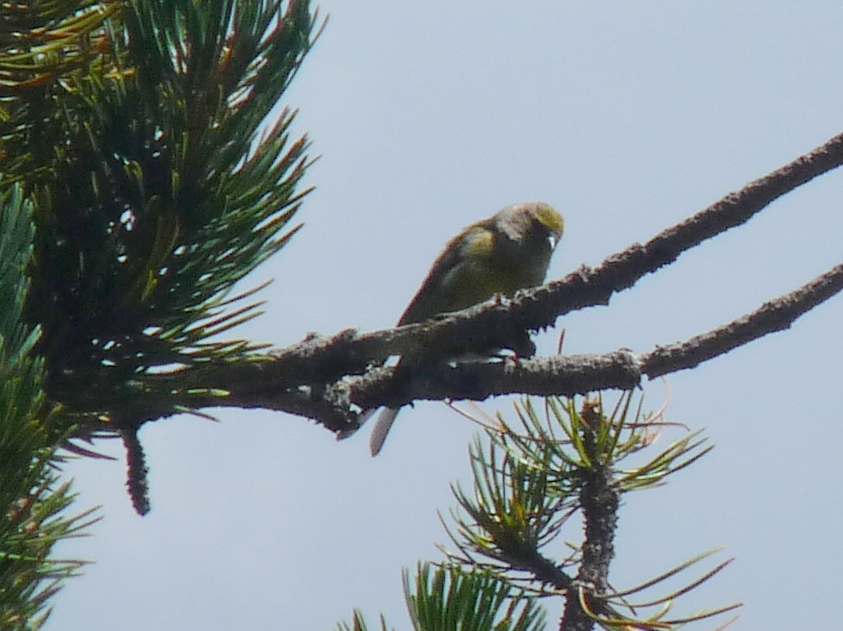 Citril Finch Carduelis citrinella, near Barcelona, Spain.